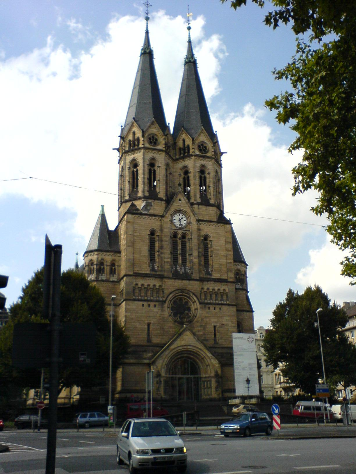 Das Bild zeigt die Ringkirche in Wiesbaden mit ihrem 65 m hohen Zwillingsturm. (Ansicht in Richtung Westen von der Rheinstraße aus. Baujahr der Ringkirche: 1894. Vgl. auch Wiesbadener Programm. Selbst fotografiert von Querido am 7. September 2006.